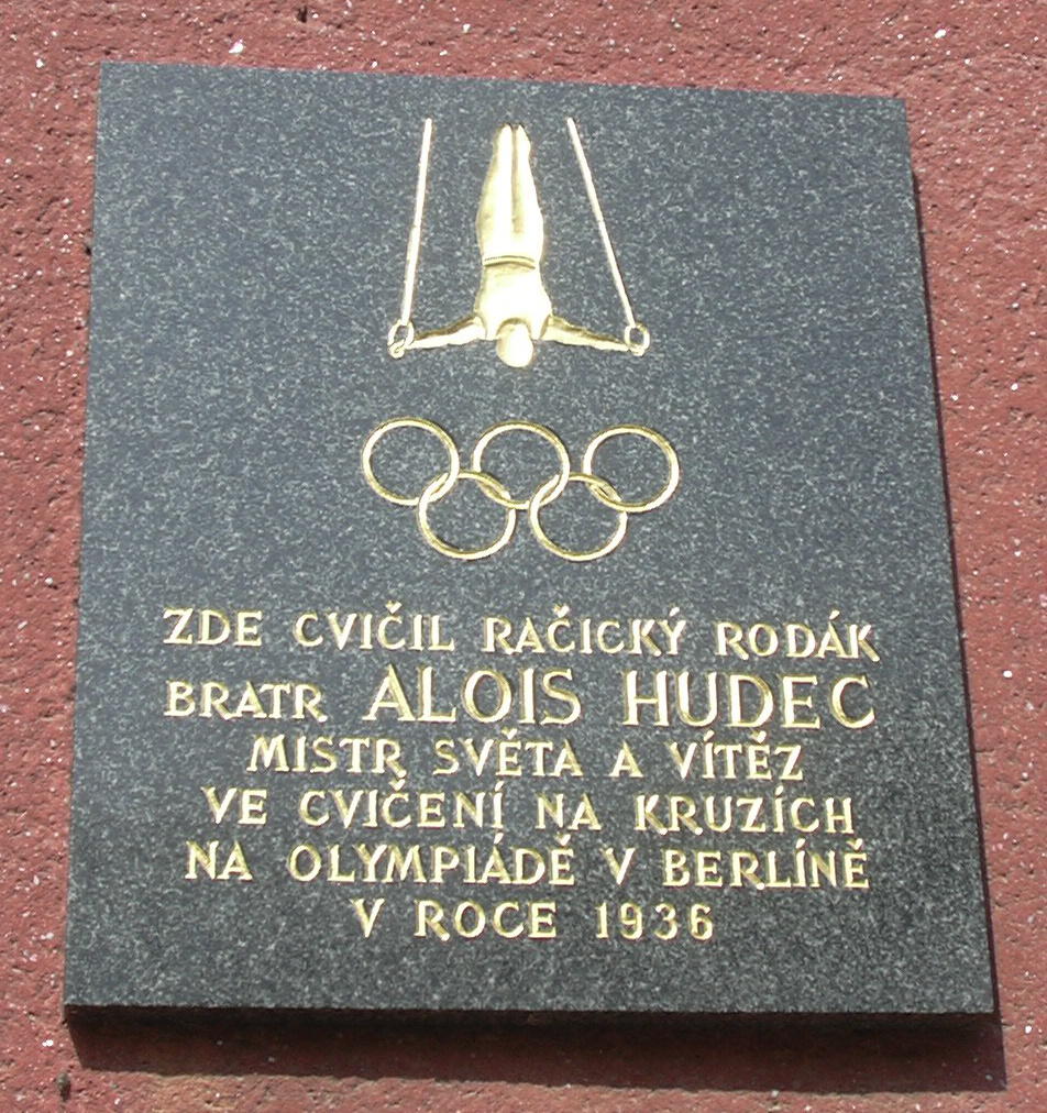 Pametni deska Aloise Hudce - Račice (Vyškov District, Czech Republic)